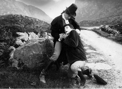 The Colleen Bawn (1911), production Kalem, réalisation Sidney Olcott avec Sidney Olcott (à genou) et J. P. McGowan.